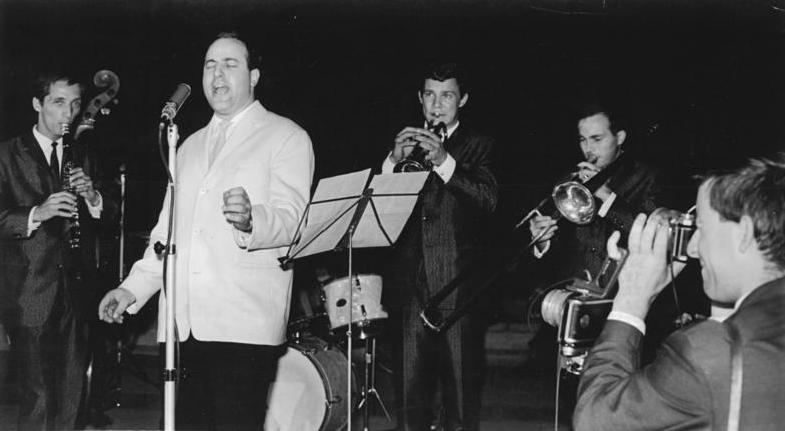 Zentralbild-Spremberg Nl-At. 26.7.1964 Sommerfilmtage in Berlin eröffnet Die Uraufführung des DEFA-Abenteuerfilms "Mir nach Canaillen" leitete am 25.7.1964 auf der malerischen Grünauer Freilichtbühne an der Regattastrecke zugleich die Sommerfilmtage 1964 in Berlin ein. Der Progress-Film-Vertrieb hatte für Stimmung an diesem schönen Sommerabend gesorgt. Beliebte Künstler wie Manfred Krug und die Jazz-Optimisten (unser Bild), Mary Halfkath und Gerry Wolf boten ein buntes Estradenprogramm."